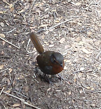 Picture of Scelorchilus rubecula